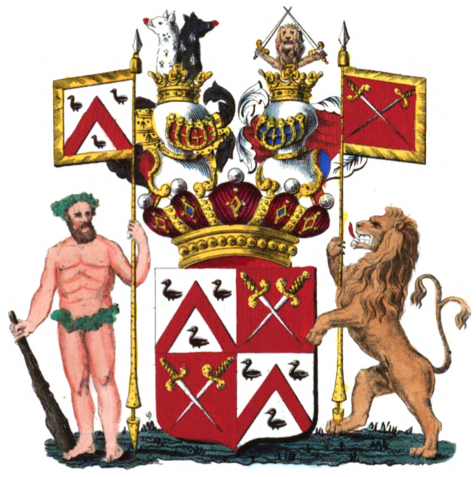 Armoiries de la famille van der Gracht de Rommerswael